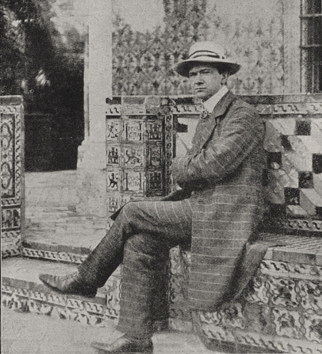 Otto Boyer, Düsseldorfer Maler und Schriftsteller starb plötzlich in der Nacht zum 30. Dezember 1912. Das Bild zeigt ihn auf einer Studienreise in Granada.